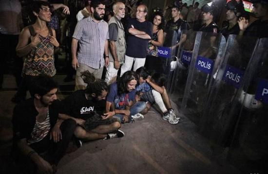 Adalet Yürüyüşü Gümüşsuyunda engellendi